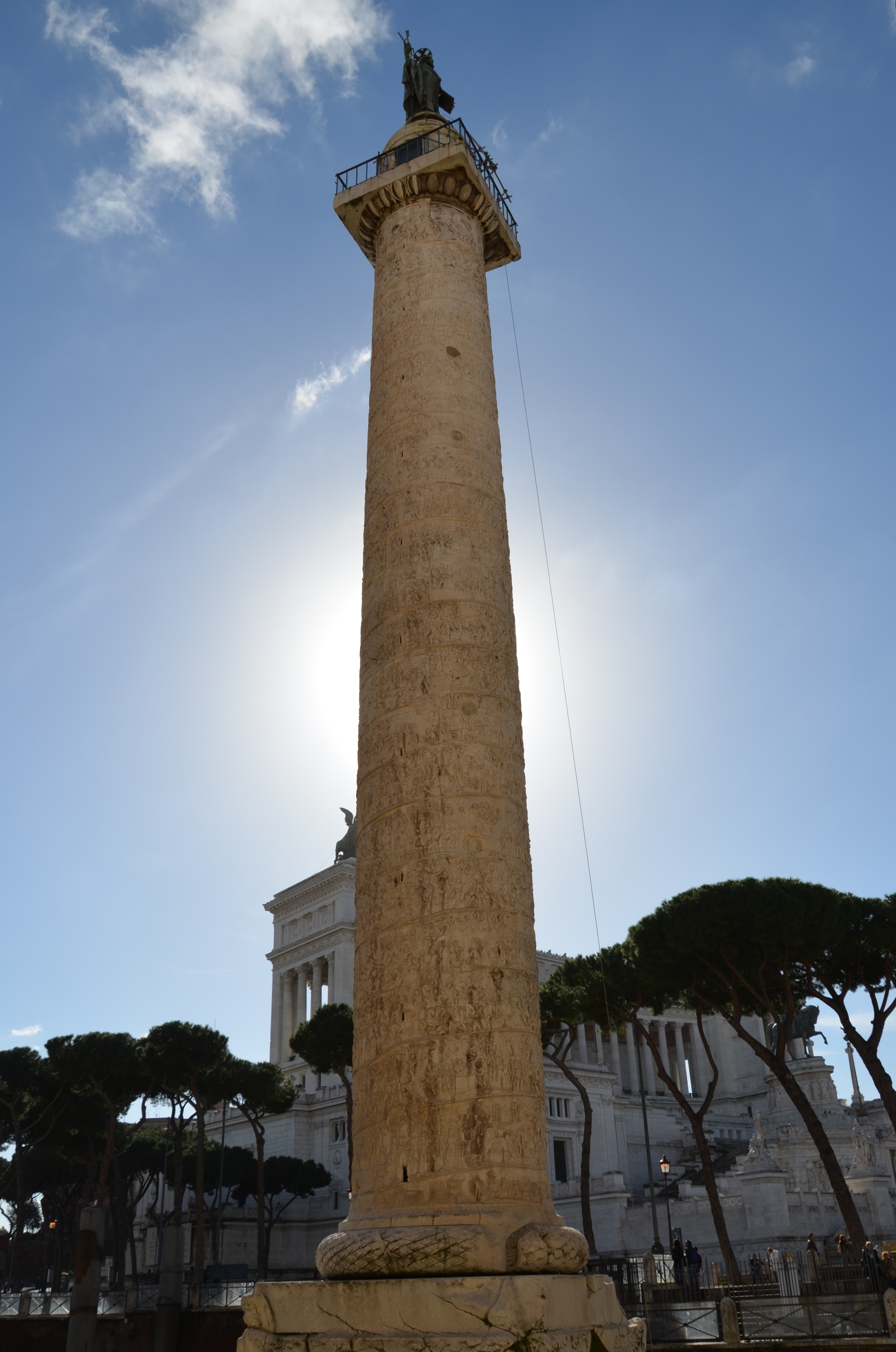 Trajan's Column, Rome